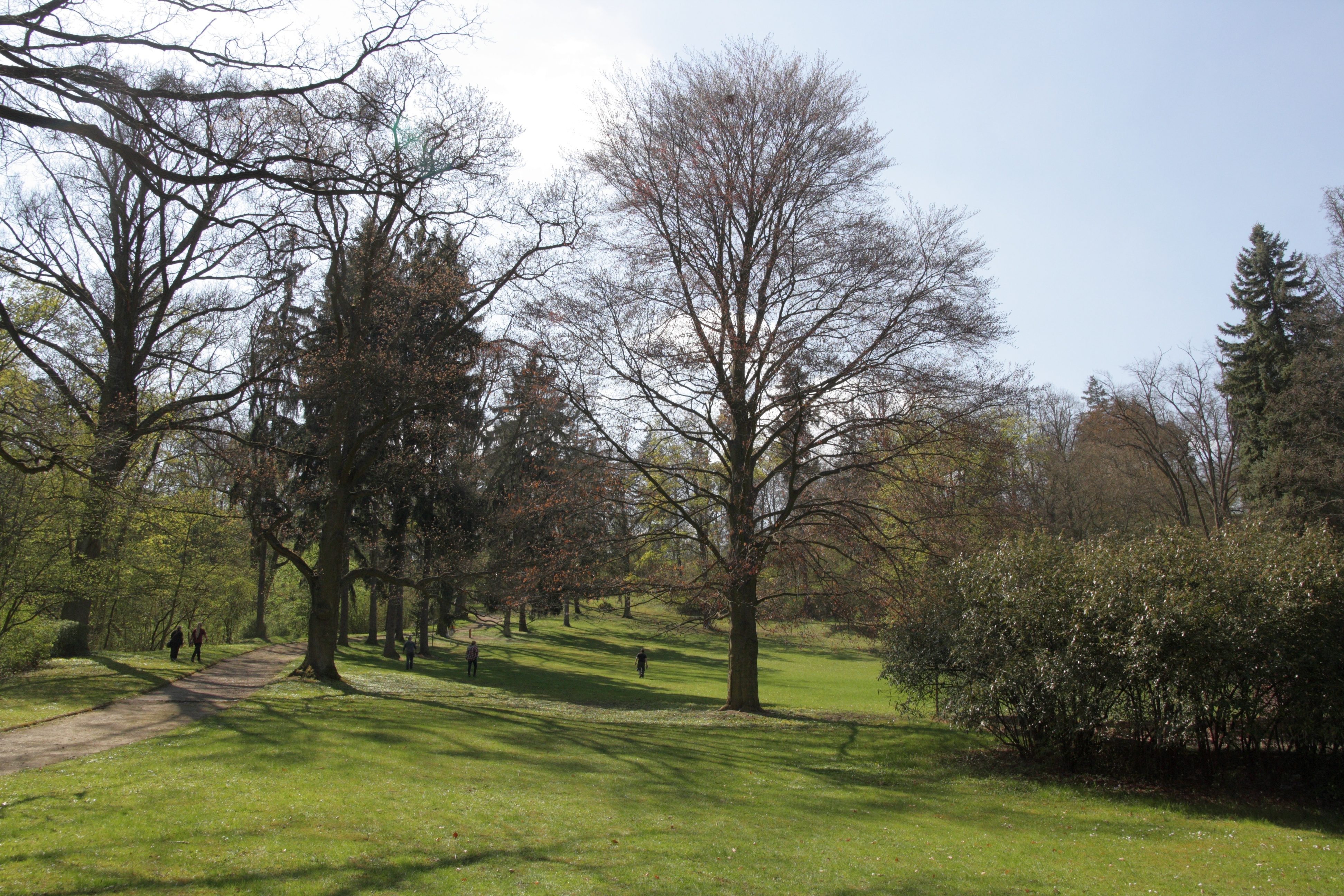 Moravský Krumlov - zámecký park.